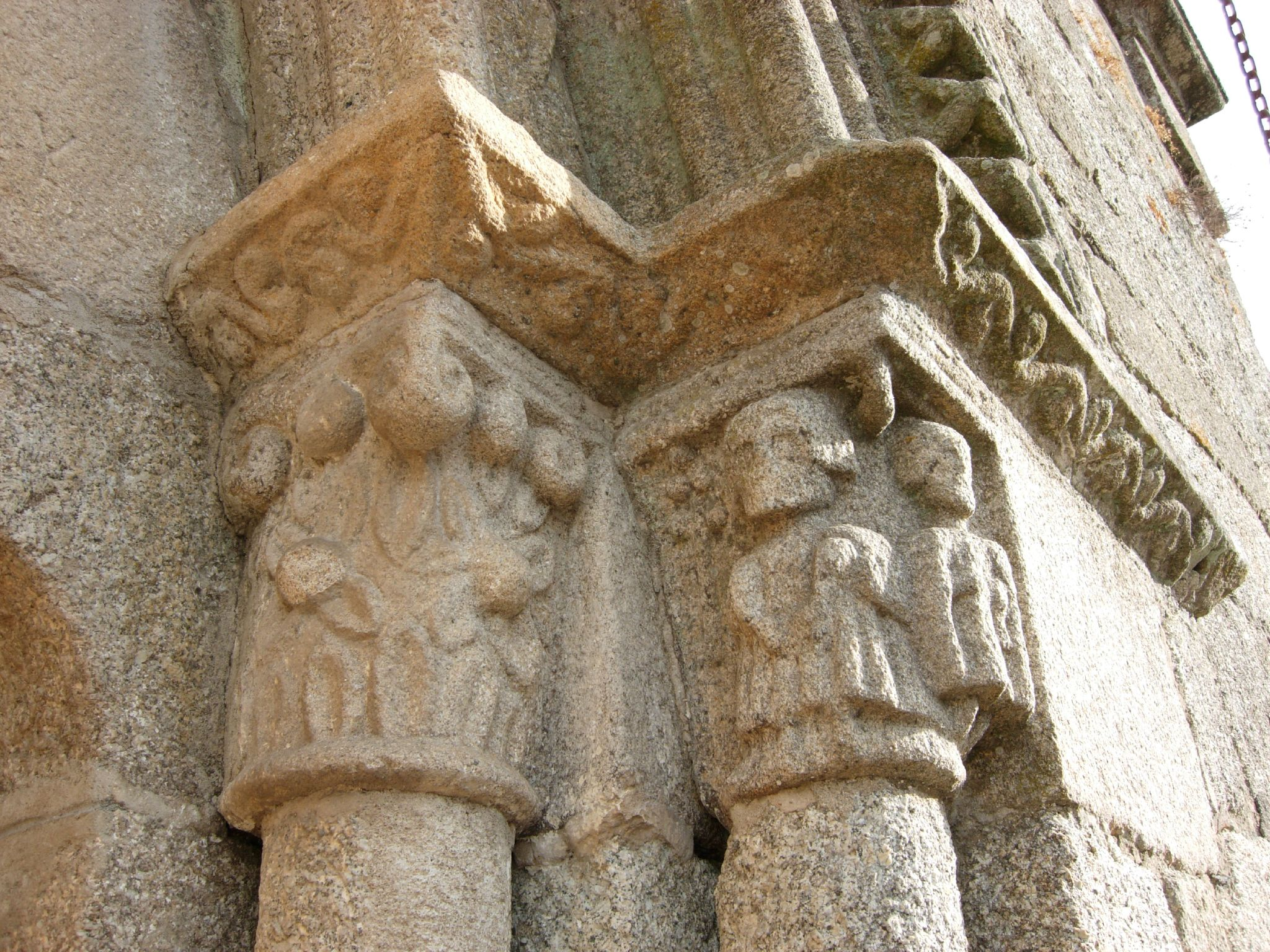 Igrexa románica de San Xoán de Sadurnín. Capiteis na portada ocidental.